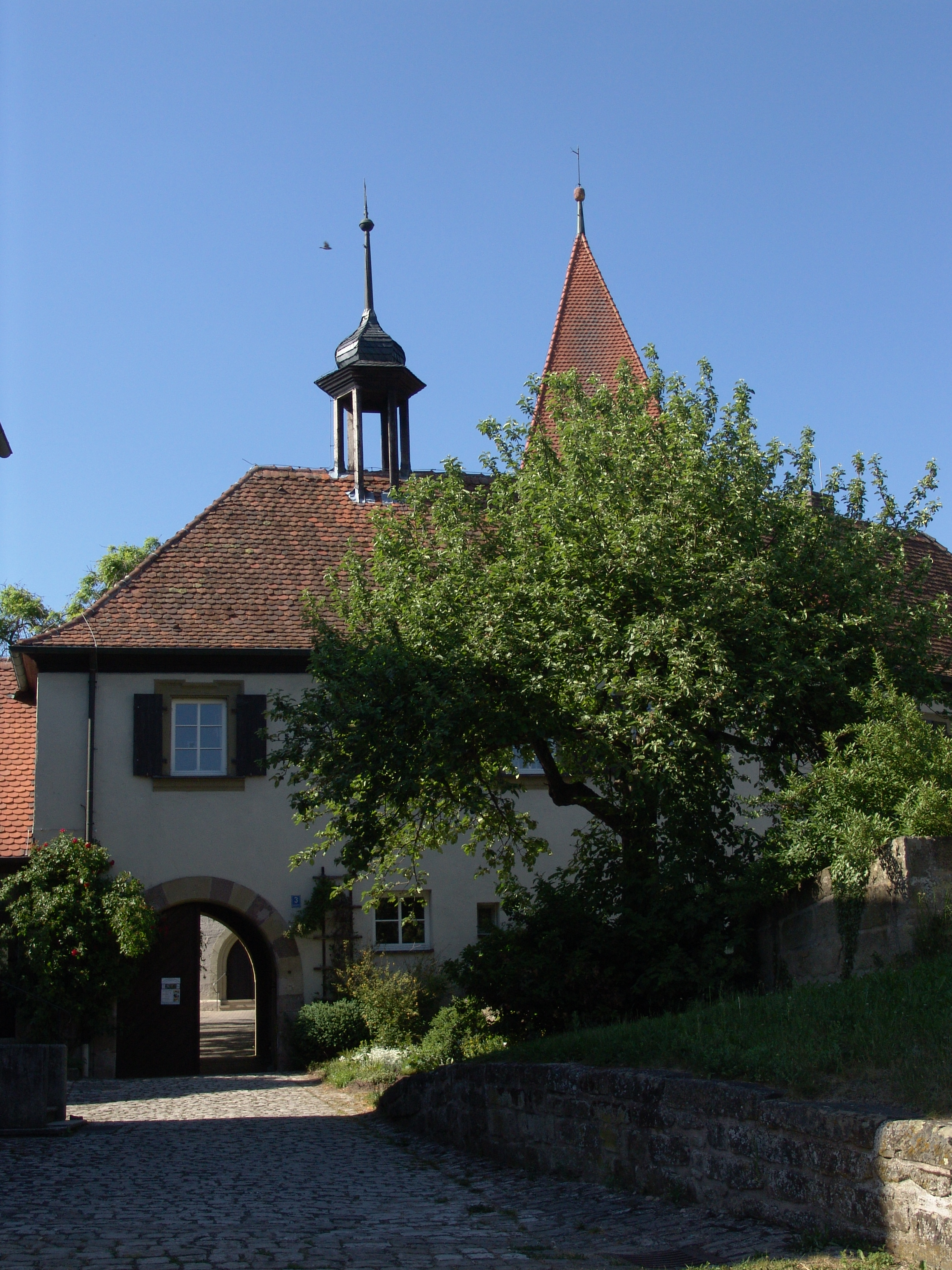 evang.-luth. Kirche St. Batholomäu in Unternesselbach